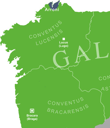 Mapa que amosa situación aproximada da tribo dos arróns ou Arroni, na provincia romana da Gallaecia